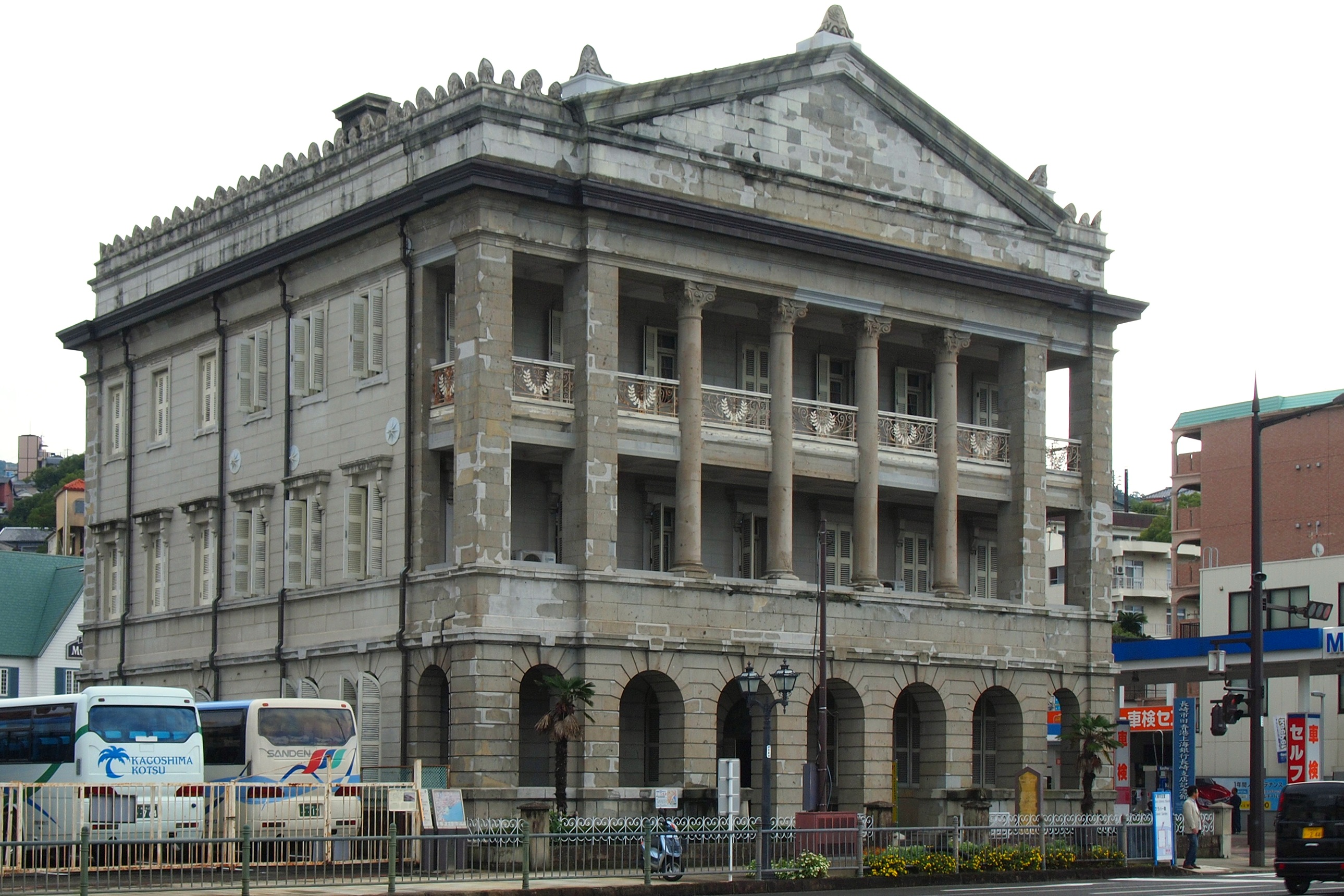 旧上海銀行長崎支店（長崎県長崎市）